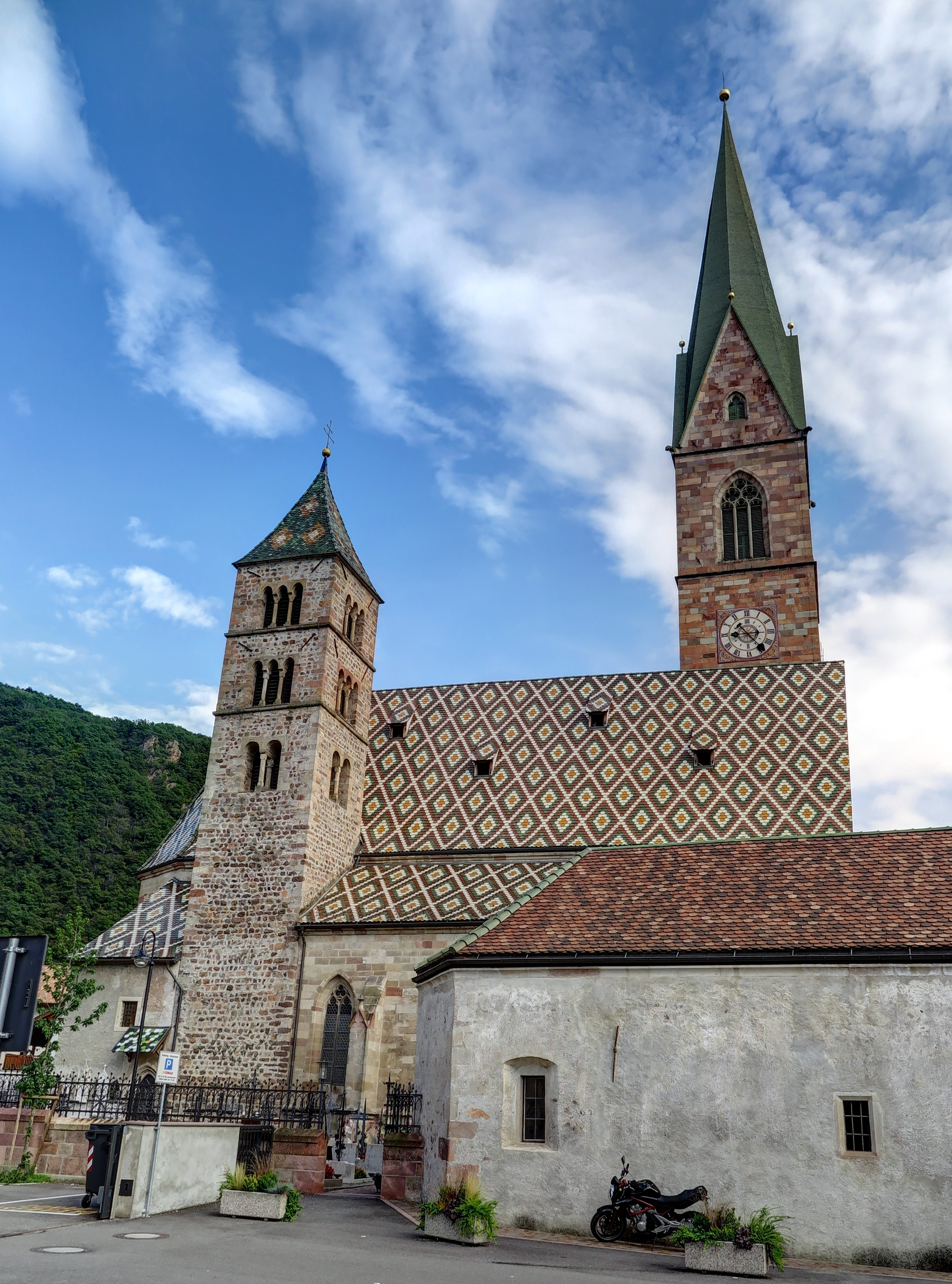 Italien, Südtirol, Terlan, Pfarrkirche Maria Himmelfahrt